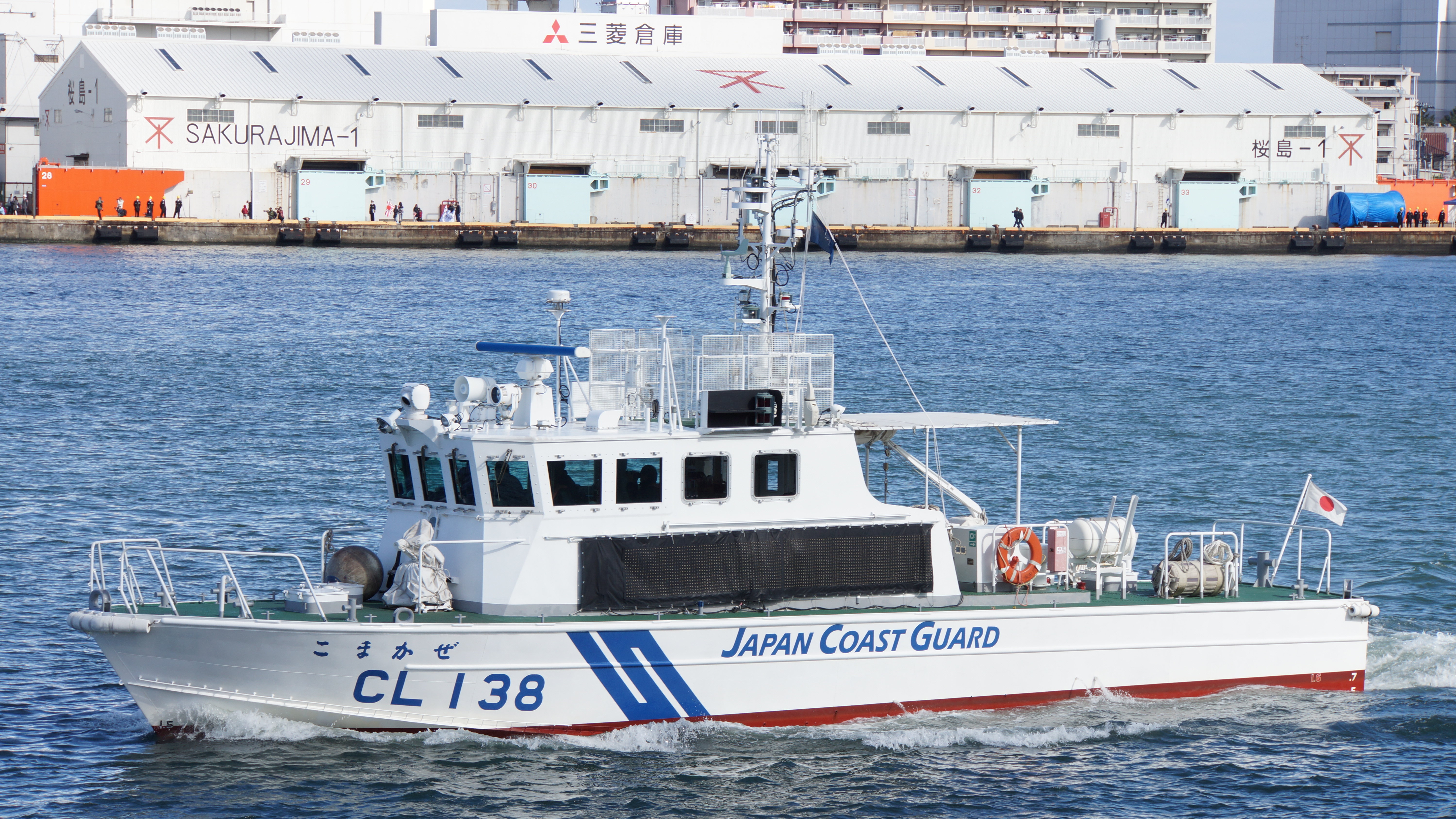 海上保安庁 巡視船こまかぜ（CL-138）。 2016年3月21日 大阪港にて。